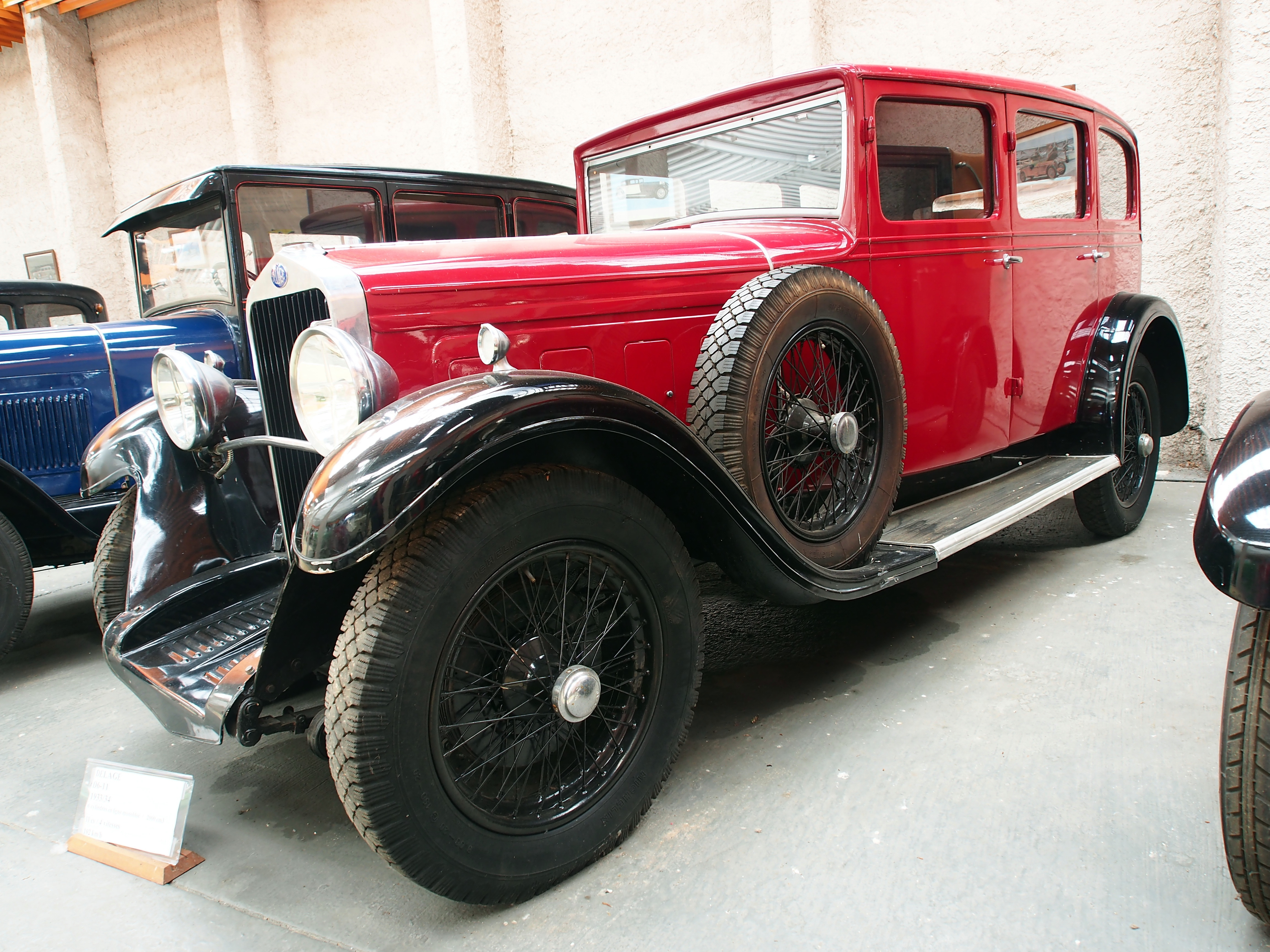 Photographed at the Association Lorraine des Amateurs d'Automobiles de collection et de loisirs.